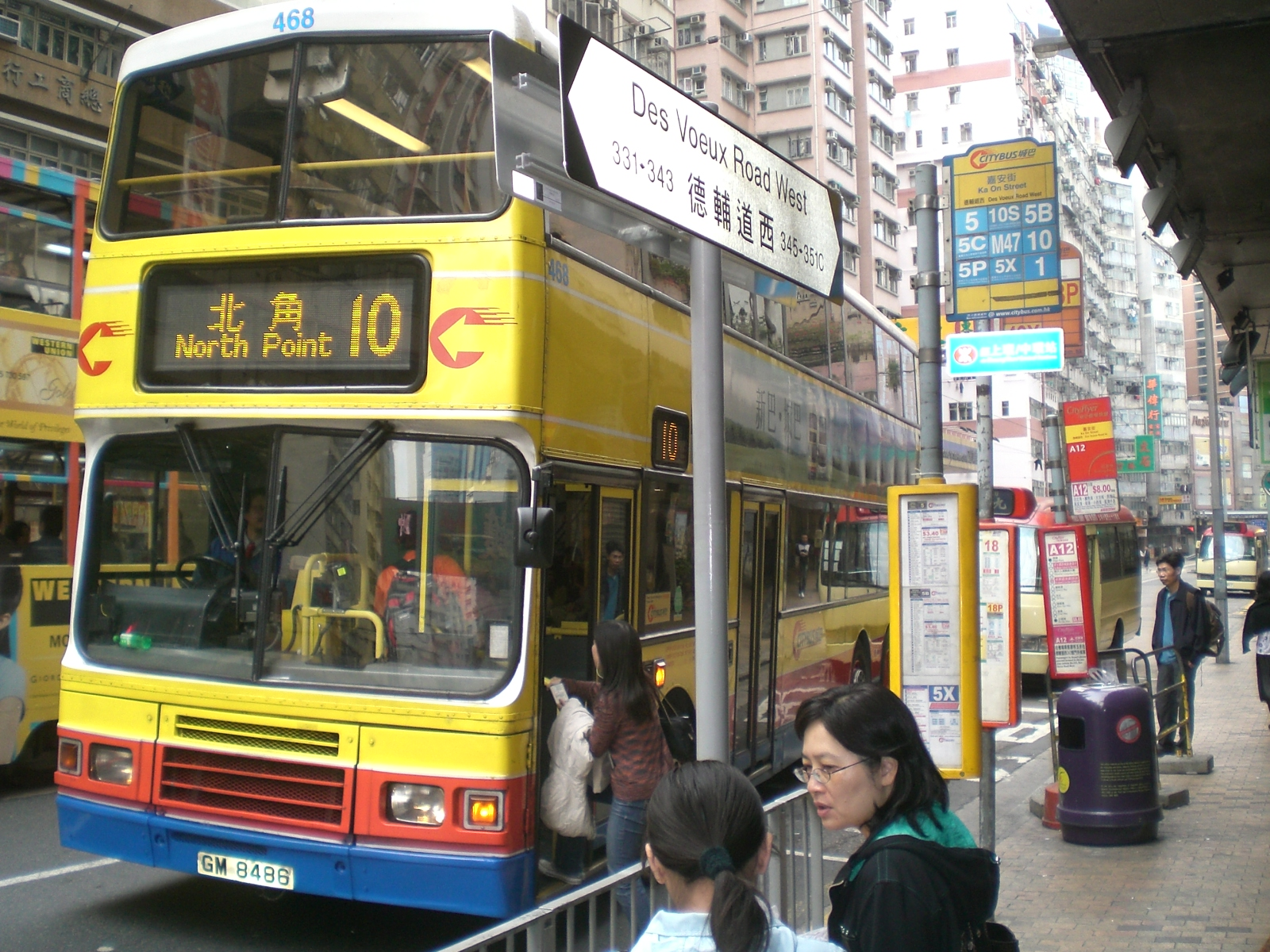 西營盤德輔道西近創業中心城巴巴士站